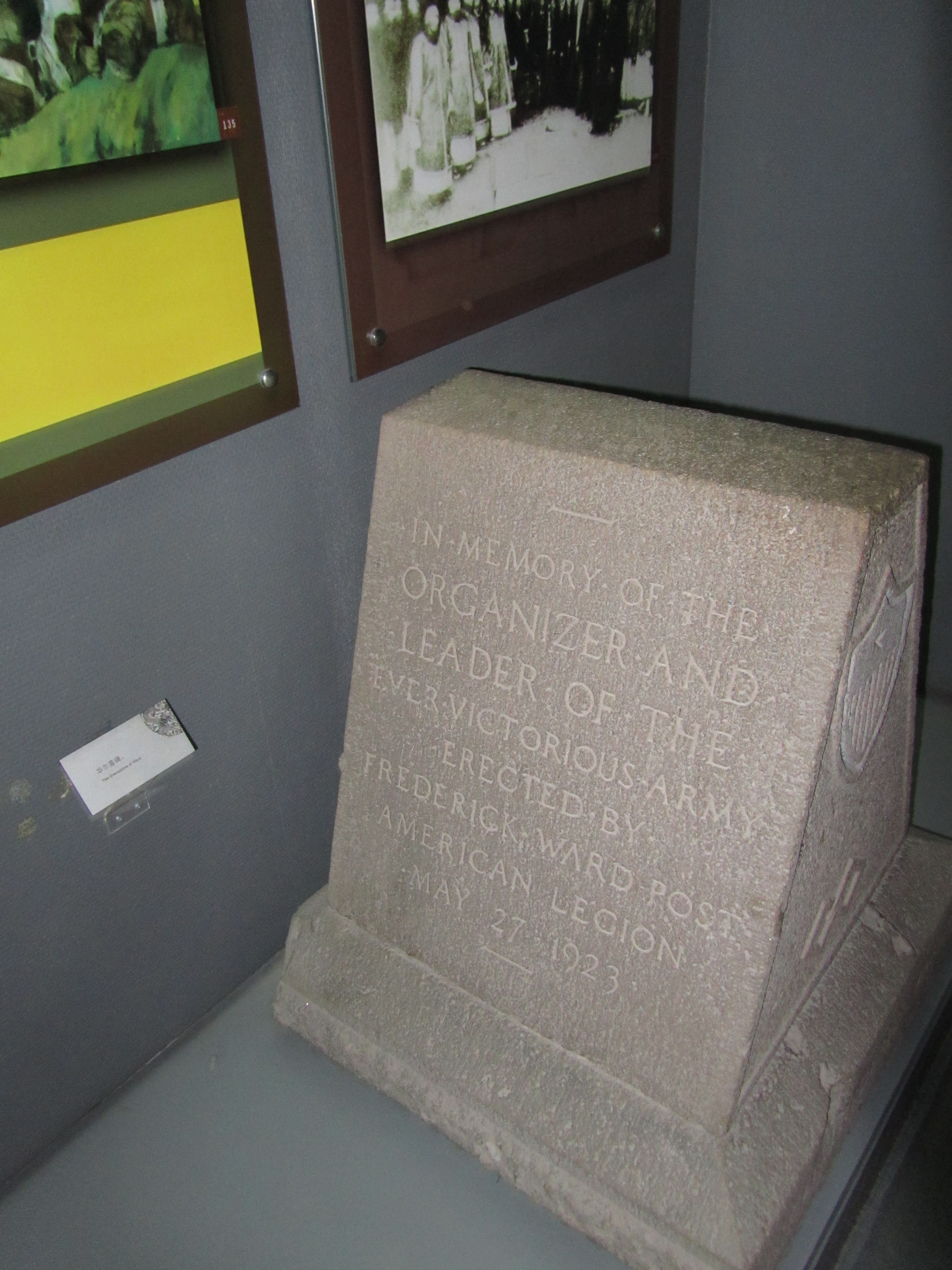 弗雷德里克·汤森德·华尔墓碑，原位于松江，现藏于南京瞻园太平天国历史博物馆。